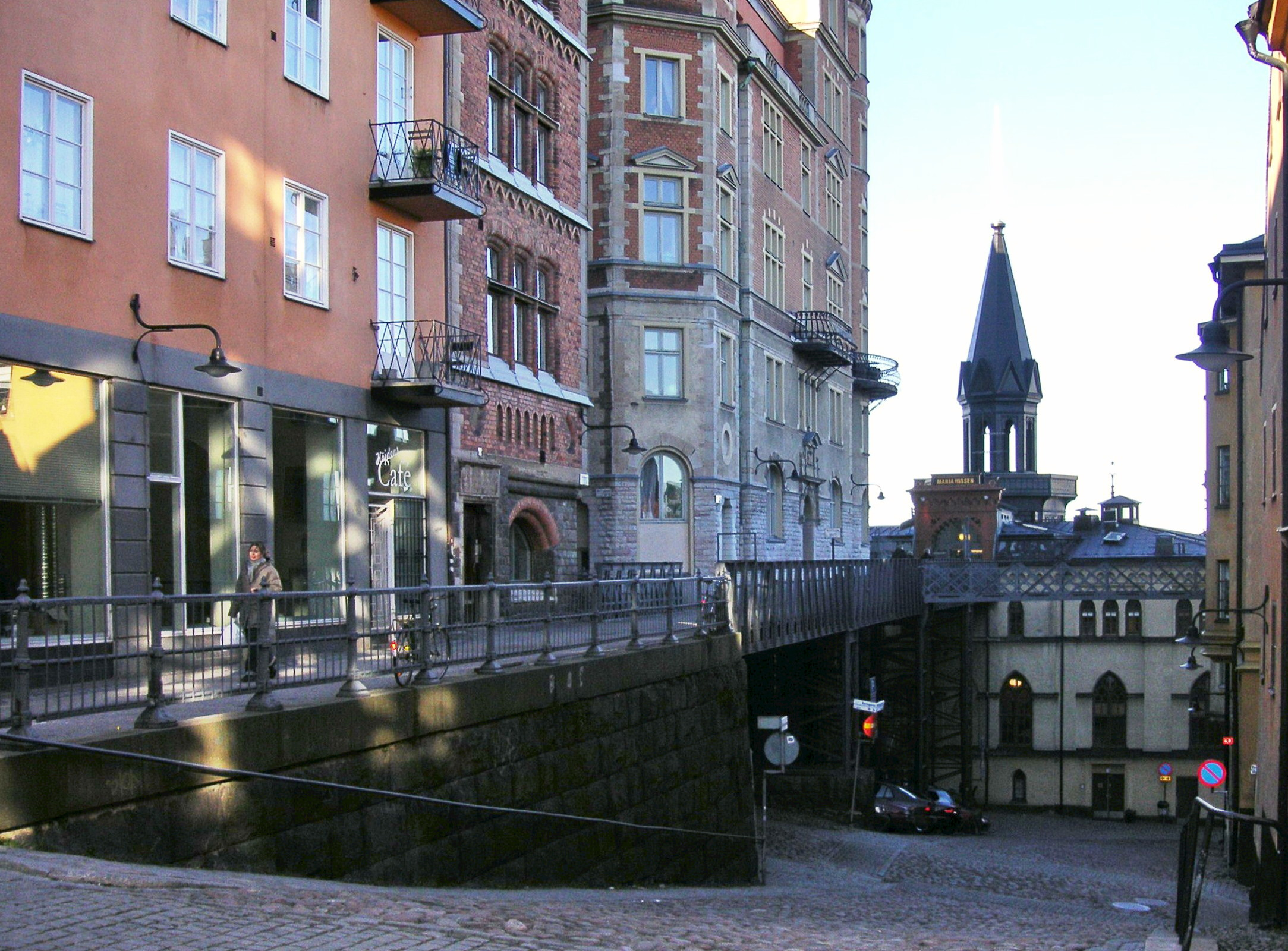 Bellmansgatan i Stockholm